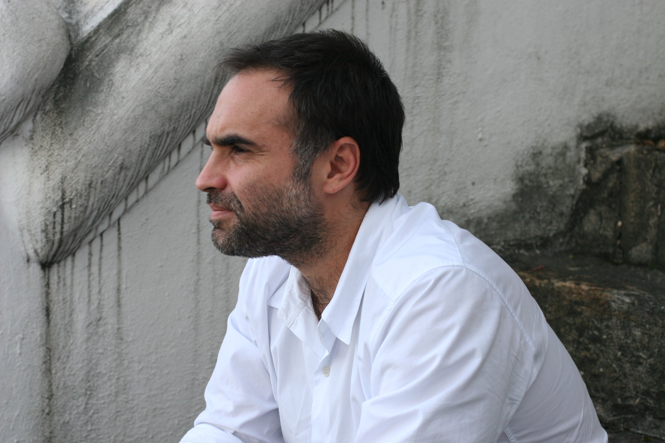 Karim Ainouz 01